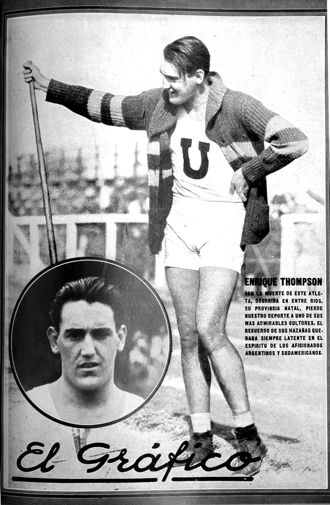 El Grafico del 29 de Diciembre de 1928. Edicion 495